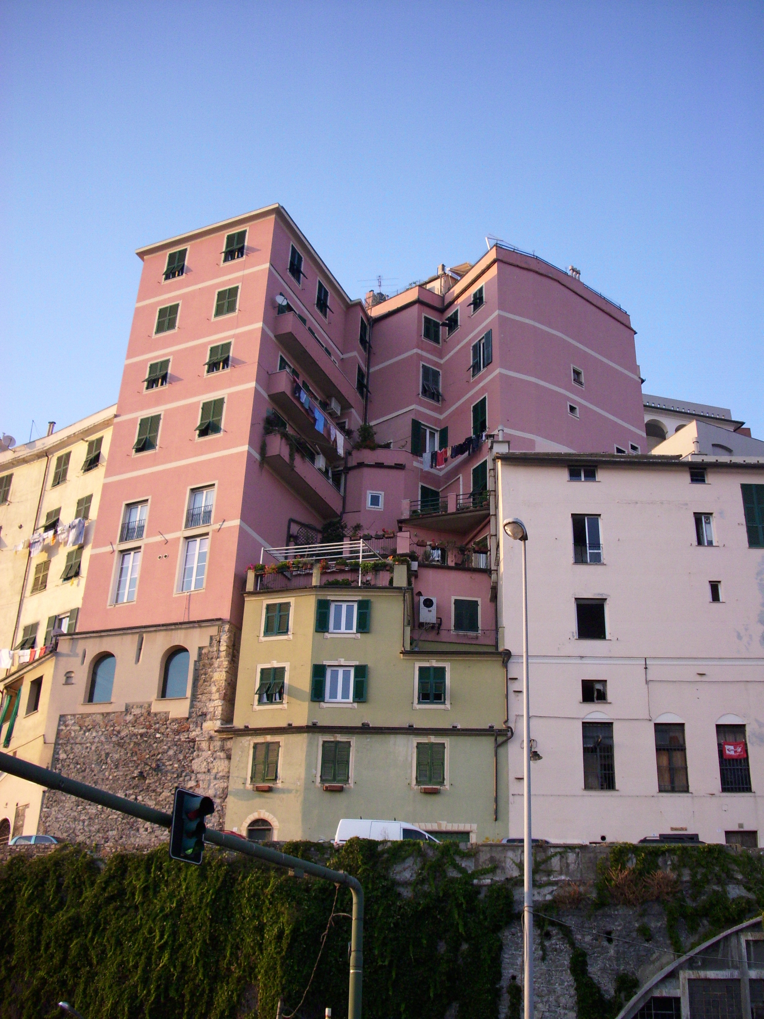 Palazzi in via Mura delle Grazie, a Genova. Particolare.